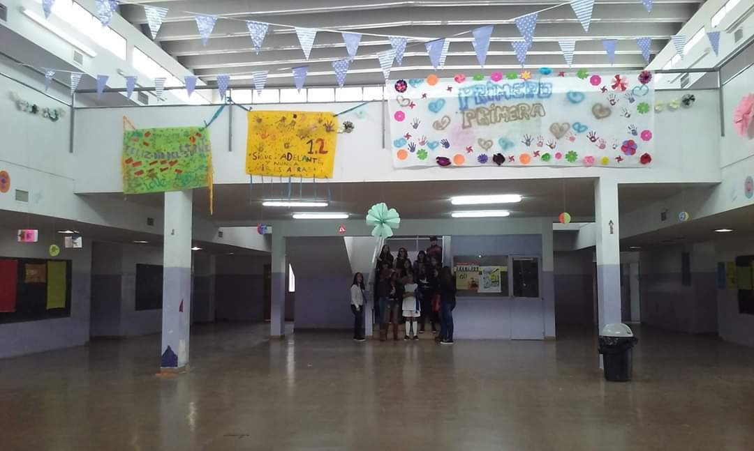 Festejo Día del estudiante ESRN N°141, Viedma, Rio Negro.